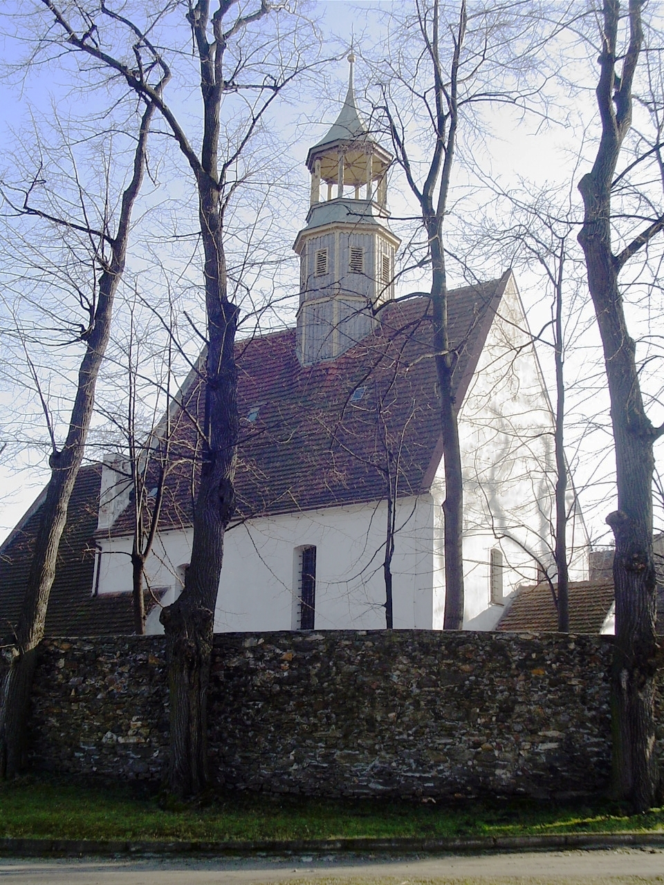 Grodziszcze - kościół parafialny p.w. św. Anny (zabytek nr rejestr. A/1790/1677 12.05.1966)